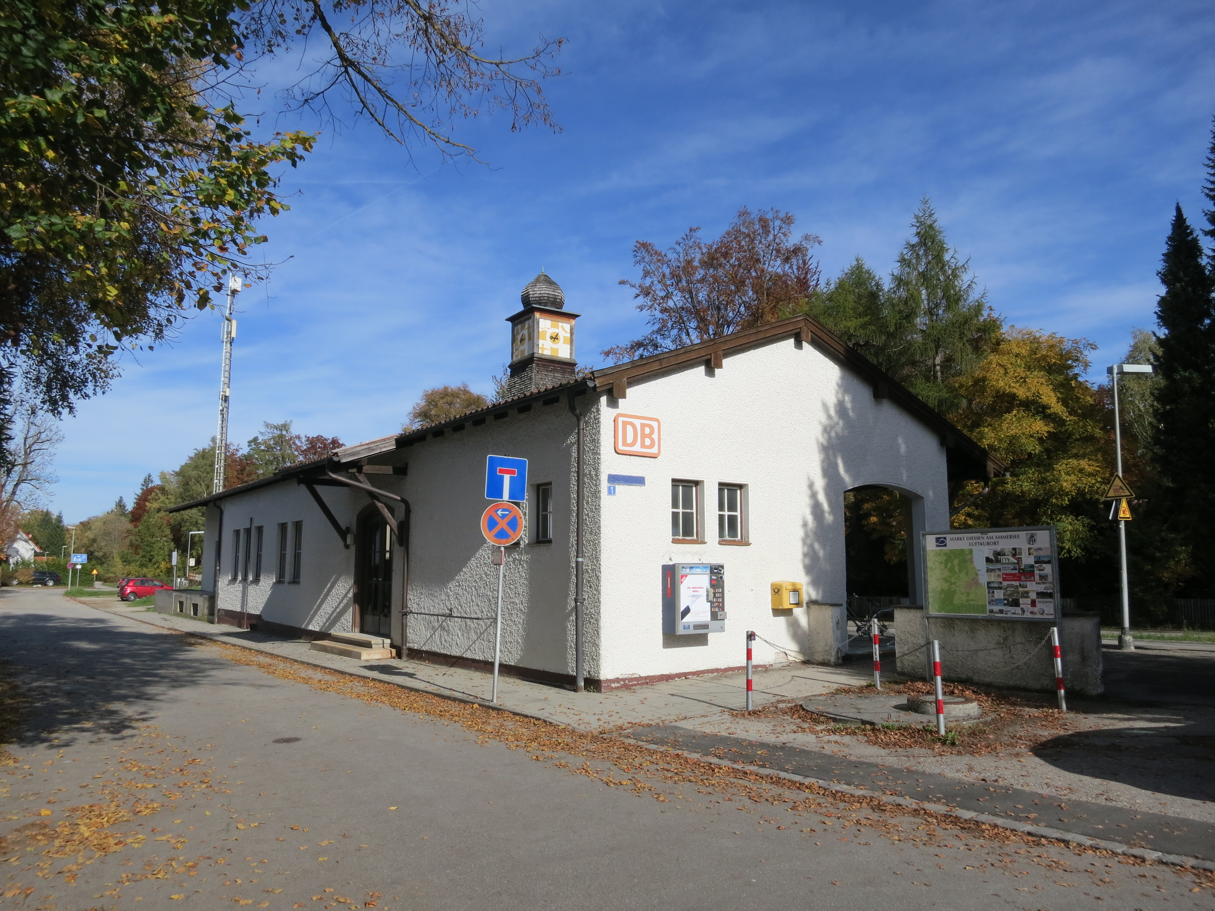 Empfangsgebäude des Bahnhofs Riederau an der Ammerseebahn von der Straßenseite